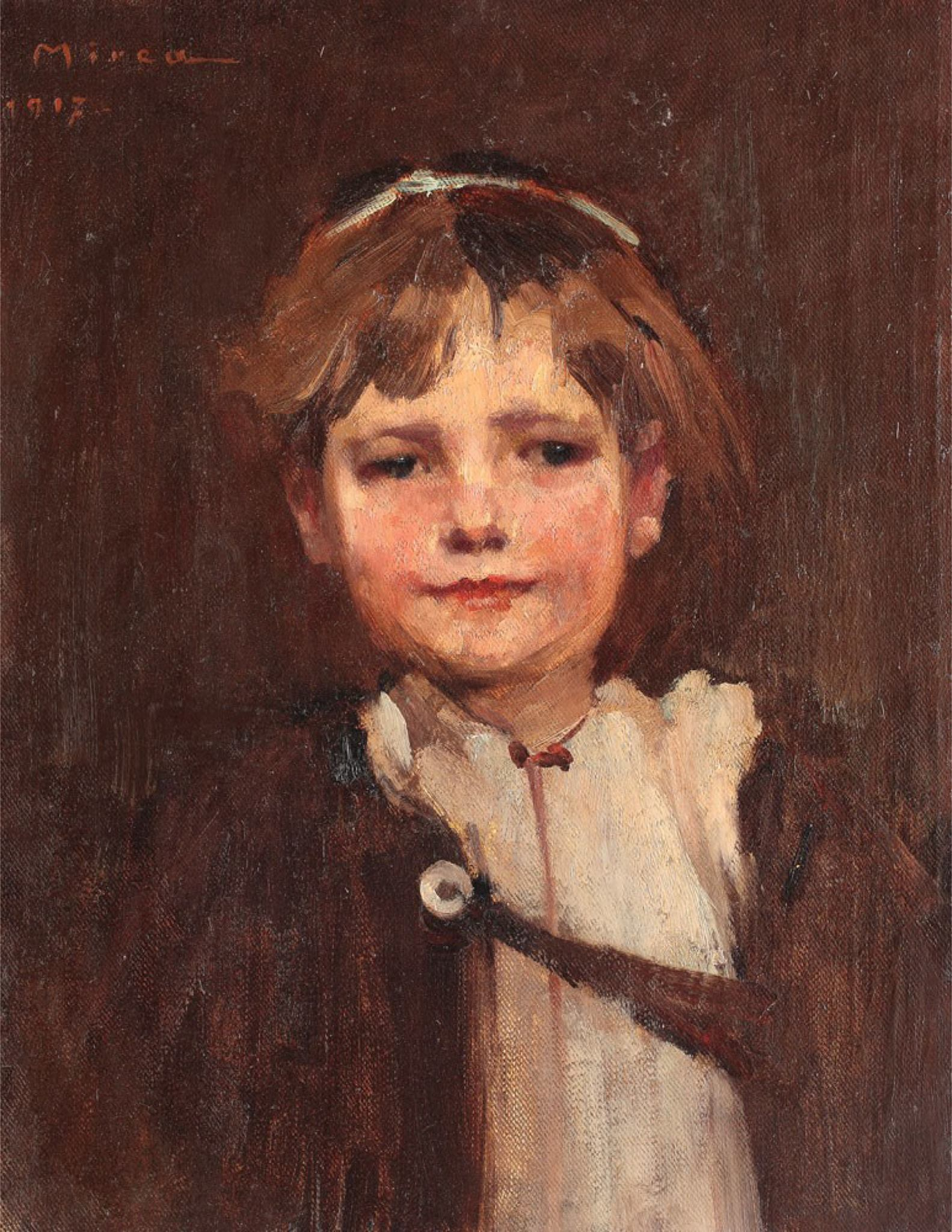 Flăcău din Ardeal